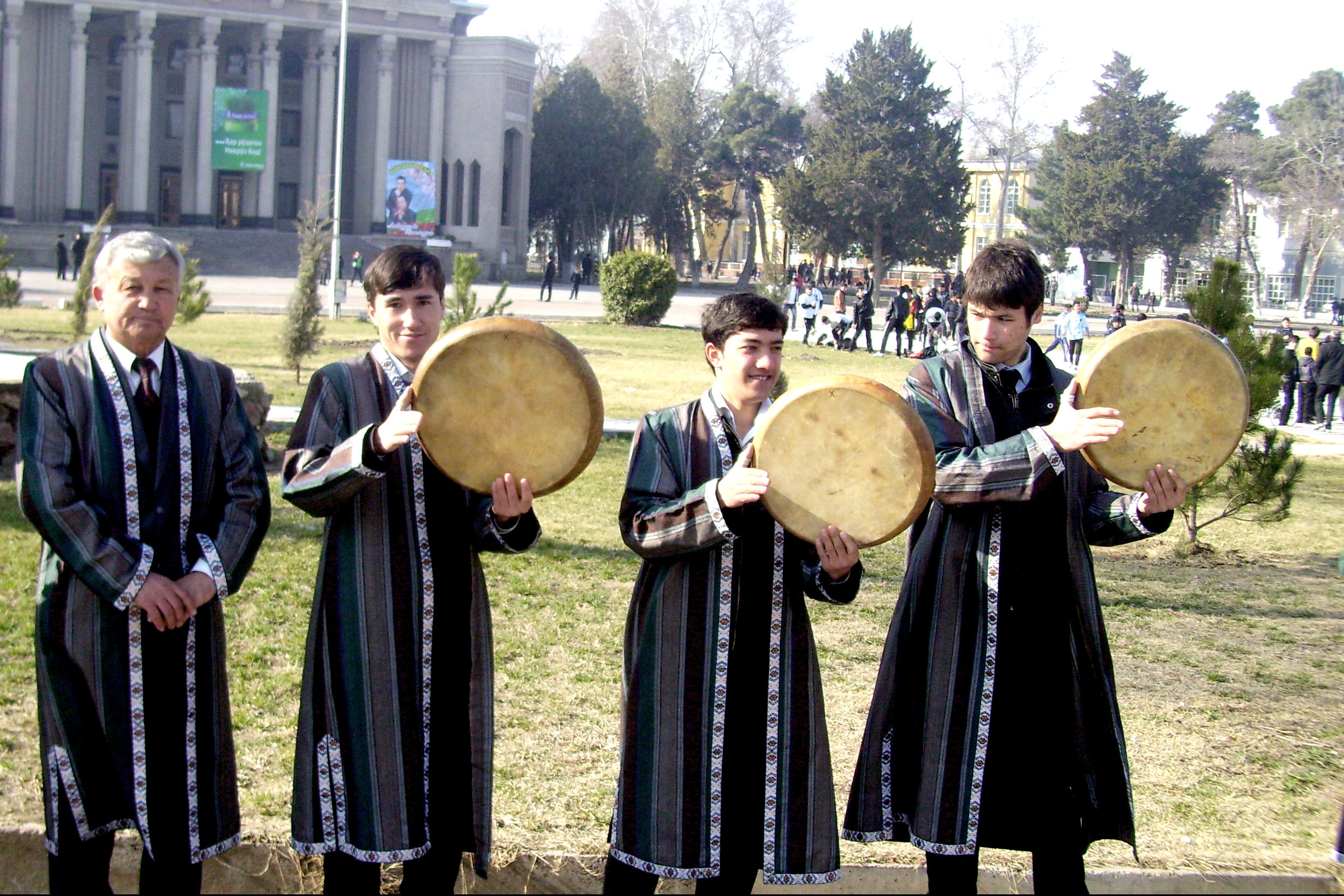 Музыканты на доире (Таджикистан) Тоҷикӣ: Доирадастон дар ш. Хуҷанд